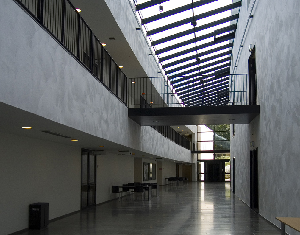 天窗，顾震弘摄于2005年8月。